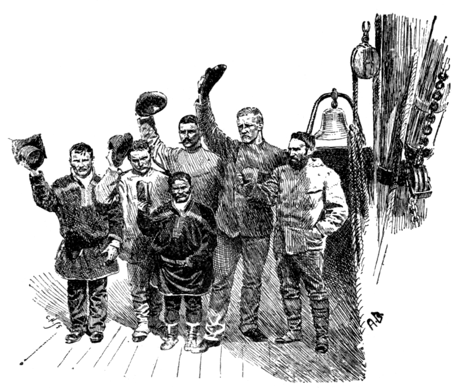 Возвращение в Норвегию участников гренландской экспедиции Нансена.